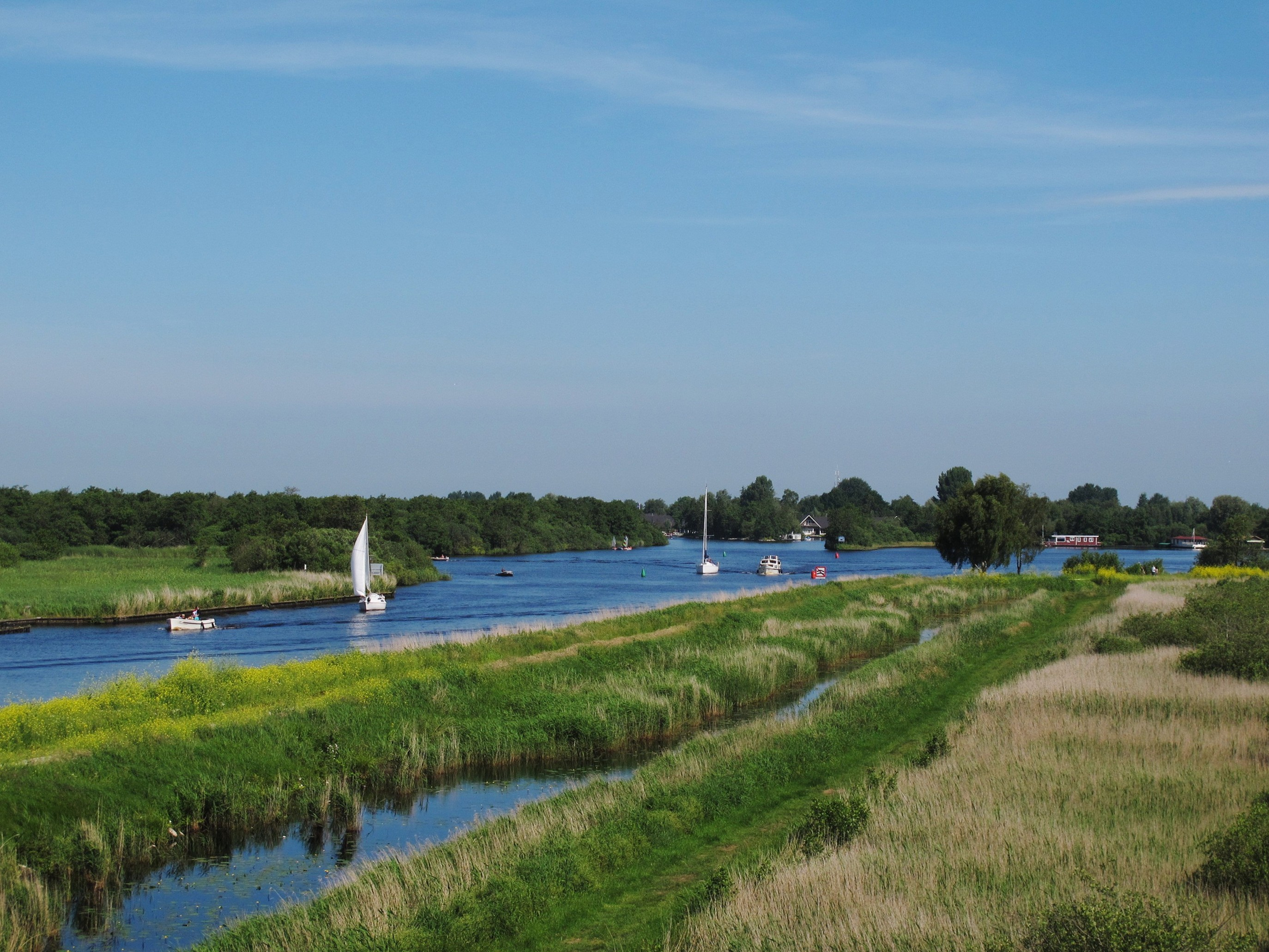 Zicht vanaf de uitkijktoren in de Jan Durks polder richting Krúsdobbe This is a photo or sound file made in De Alde Feanen National Park in the Netherlands, with the main subject of the file in the category: landscapes